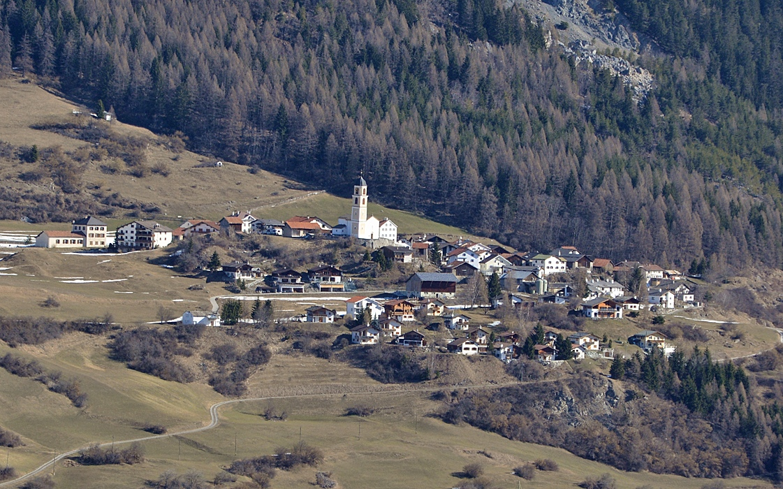 Gemeinde Brienz/Brinzauls, Graubünden. Von Mon aus gesehen.